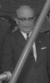 (*Teziutlán (Puebla), 6 de febrero 1890 - † Ciudad de Puebla, 1982) Fue un empresario de origen Poblano, el cual impulso el crecimiento y esparcimiento de recursos en la ciudad de Puebla. Mano derecha de Don William Oscar Jenkins Biddle. Fungió como patrono de la Fundación Mary Street Jenkins creada en Octubre de 1954 por Don William Oscar Jenkins y su esposa doña Mary Street Jenkins. Don Manuel Cabañas Pavía reflejo su nobleza y dedicación tanto en la fundación Jenkins como al estado de Puebla, realizando numerosas contribuciones benéficas en la ciudad de Puebla y sus alrededores. Dueño y presidente del Hotel Paris con dirección 2 oriente numero 202 colonia Centro. Actualmente Hotel San Pedro. hotel con una gran historia. escrituras de 1542.